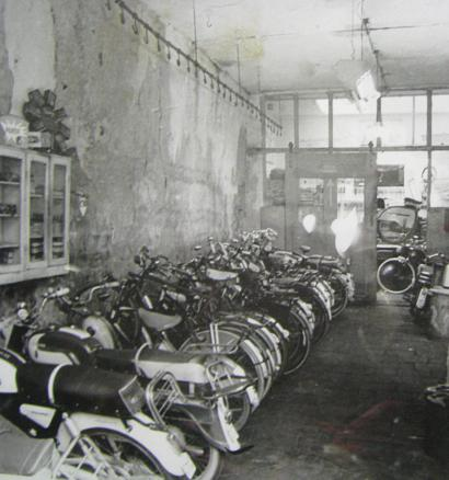 Opslagruimte en werkplaats Harings tweewielers